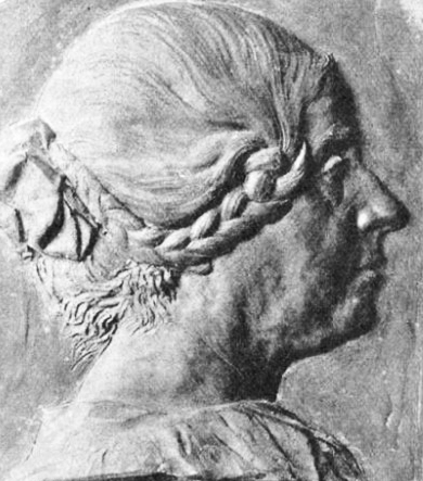 Emeline Welti-Wildbolz Porträt-Relief von Karl Hänny (1879–1972)